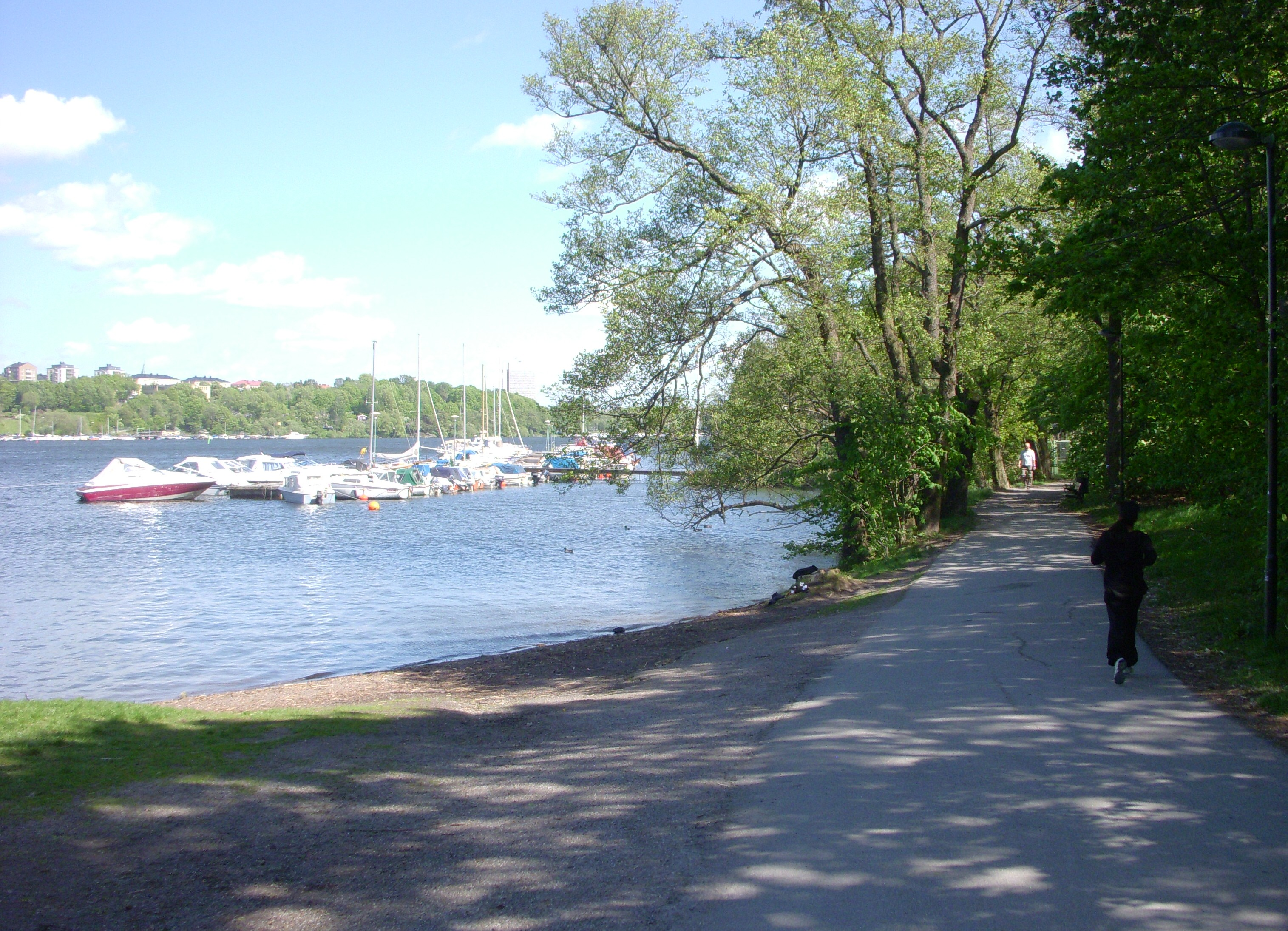 Årsta skog, promenadväg vid Årstaviken